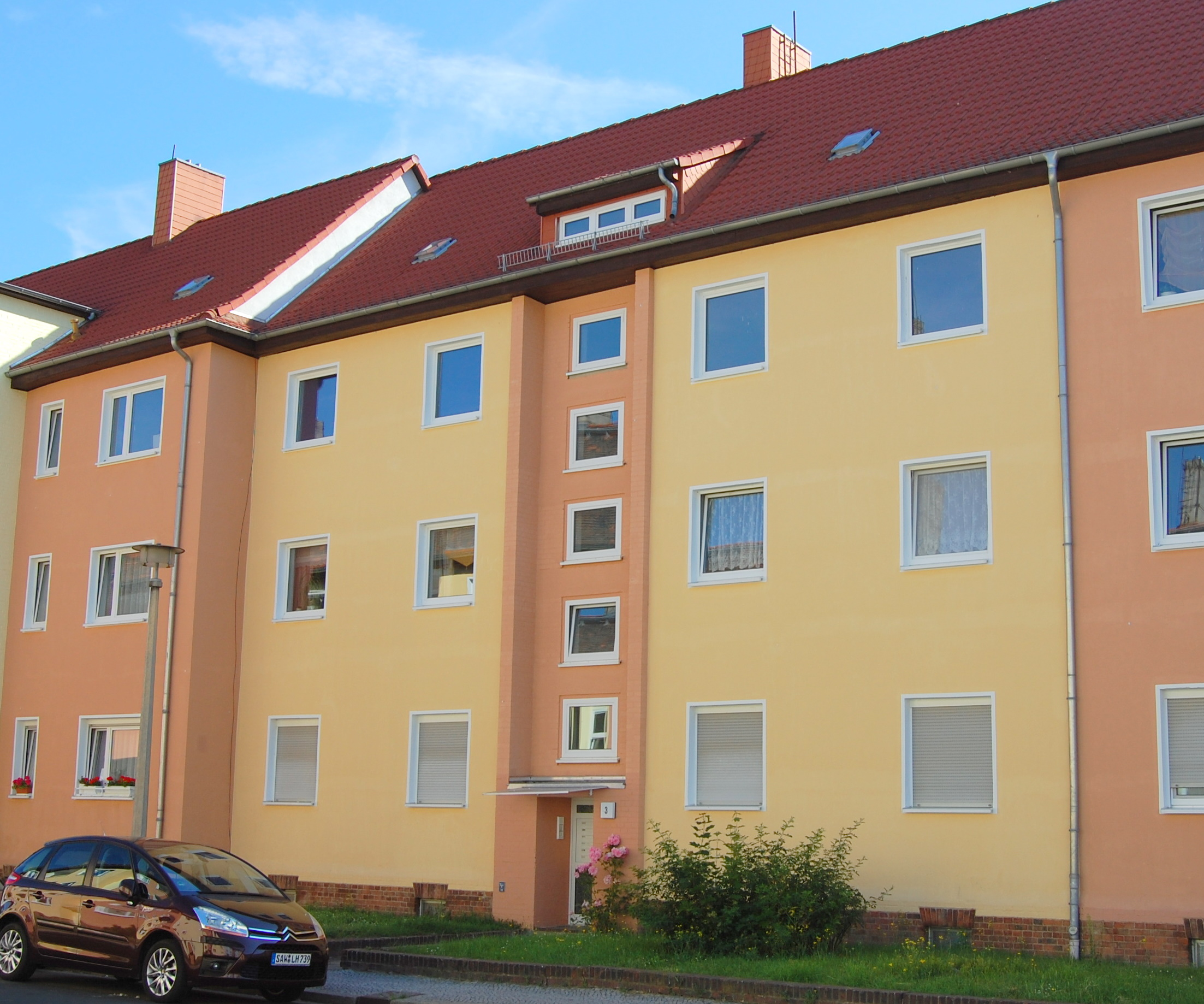 Haus Am Klosterfeld 3 in Magdeburg-Fermersleben